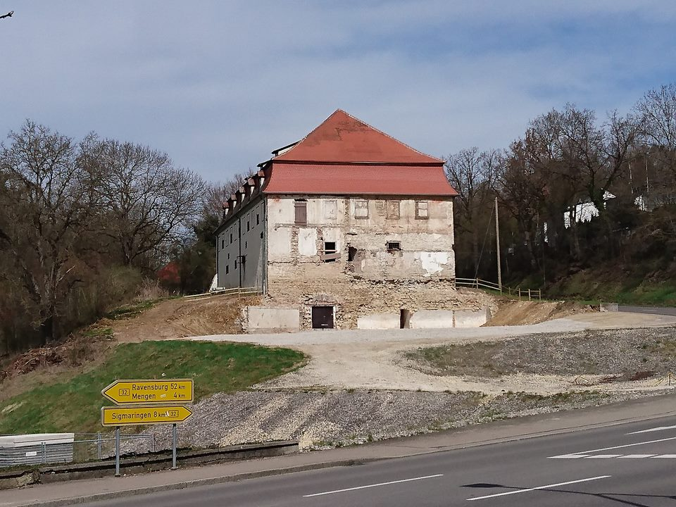 Fruchtkasten in Scheer (Sigmaringer Straße 13) nach Beendigung der Abbrucharbeiten von Sudhaus und Silo im April 2018